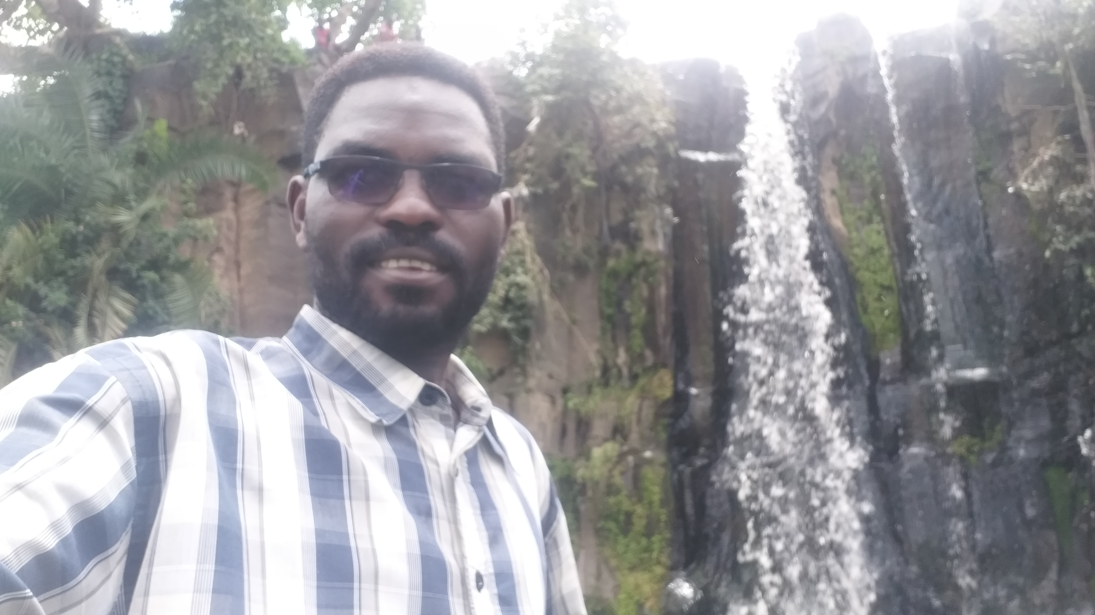 احد مشاهد منطقة نرتتي جبل مرة بولاية جنوب دارفور